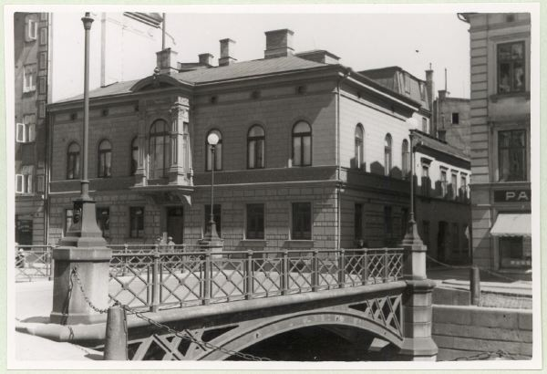 Östra Hamngatan 16/Kronhusgatan 18 i stadsdelen Nordstaden i Göteborg. Bron är Kronhusgatubron.